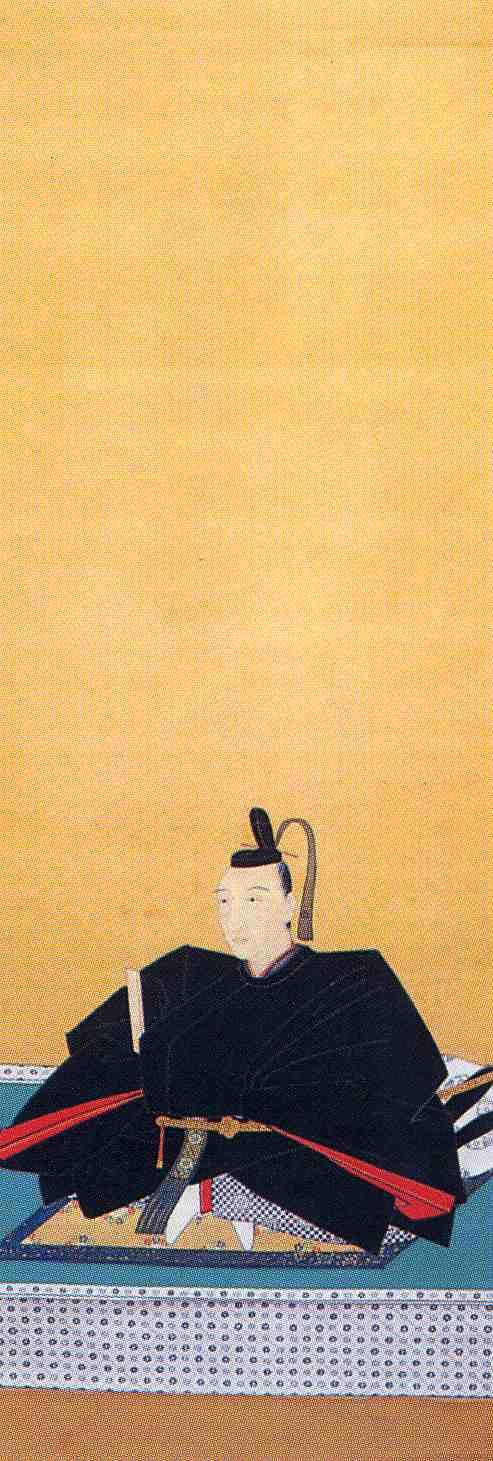 織田信長画像